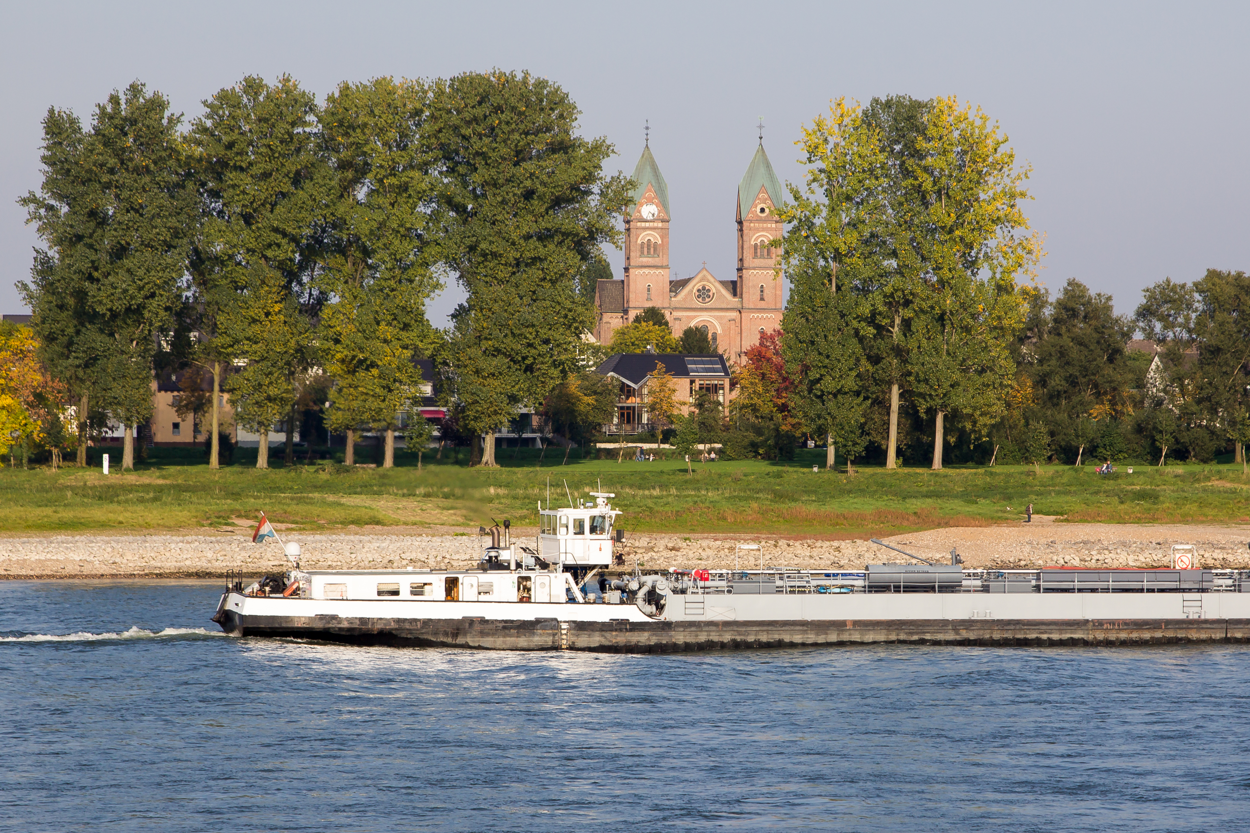 Kirche St. Stephanus in Leverkusen Hitdorf, gesehen von Köln-Langel